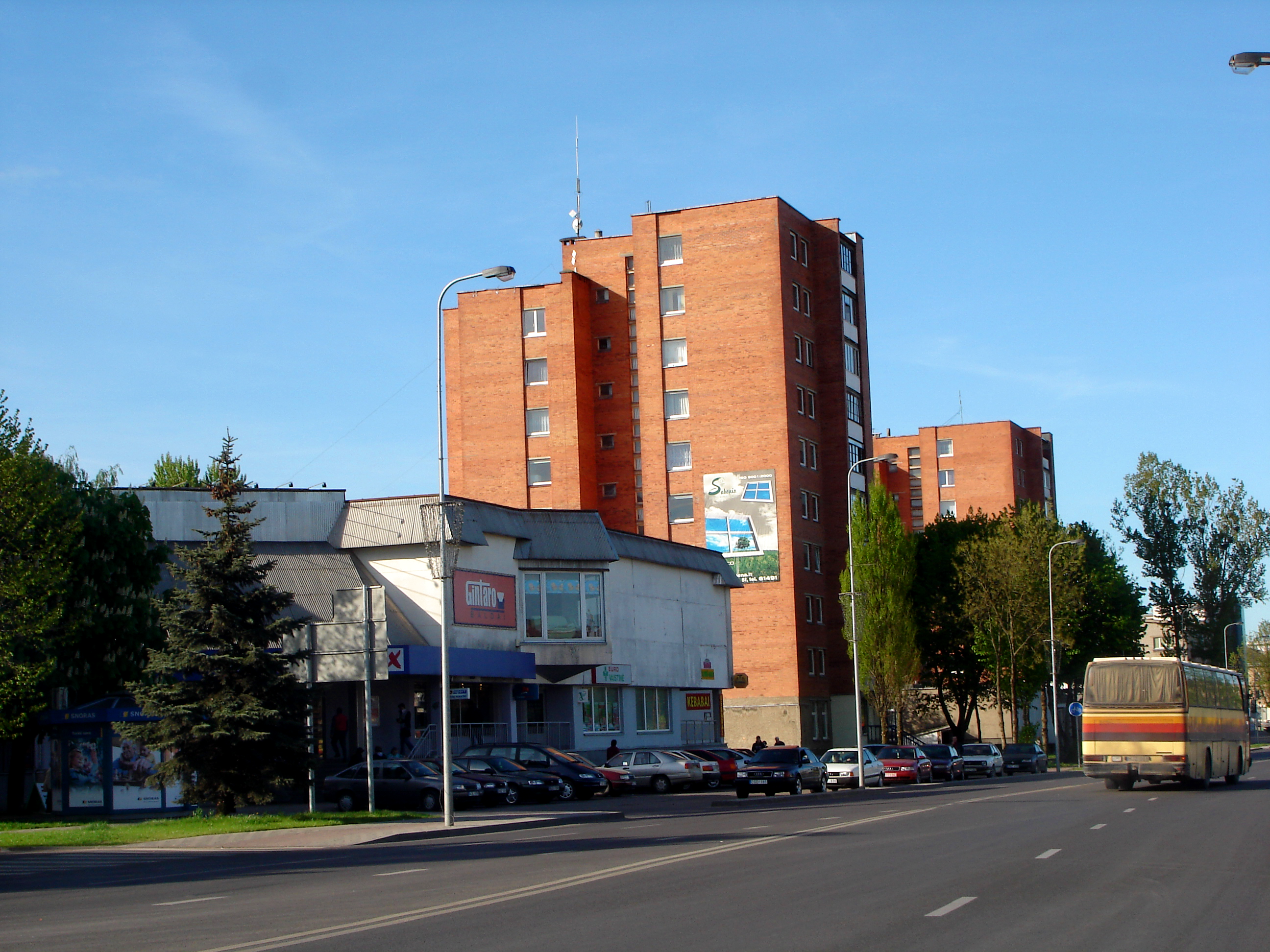 Litauen: Innenstadt von Tauragė